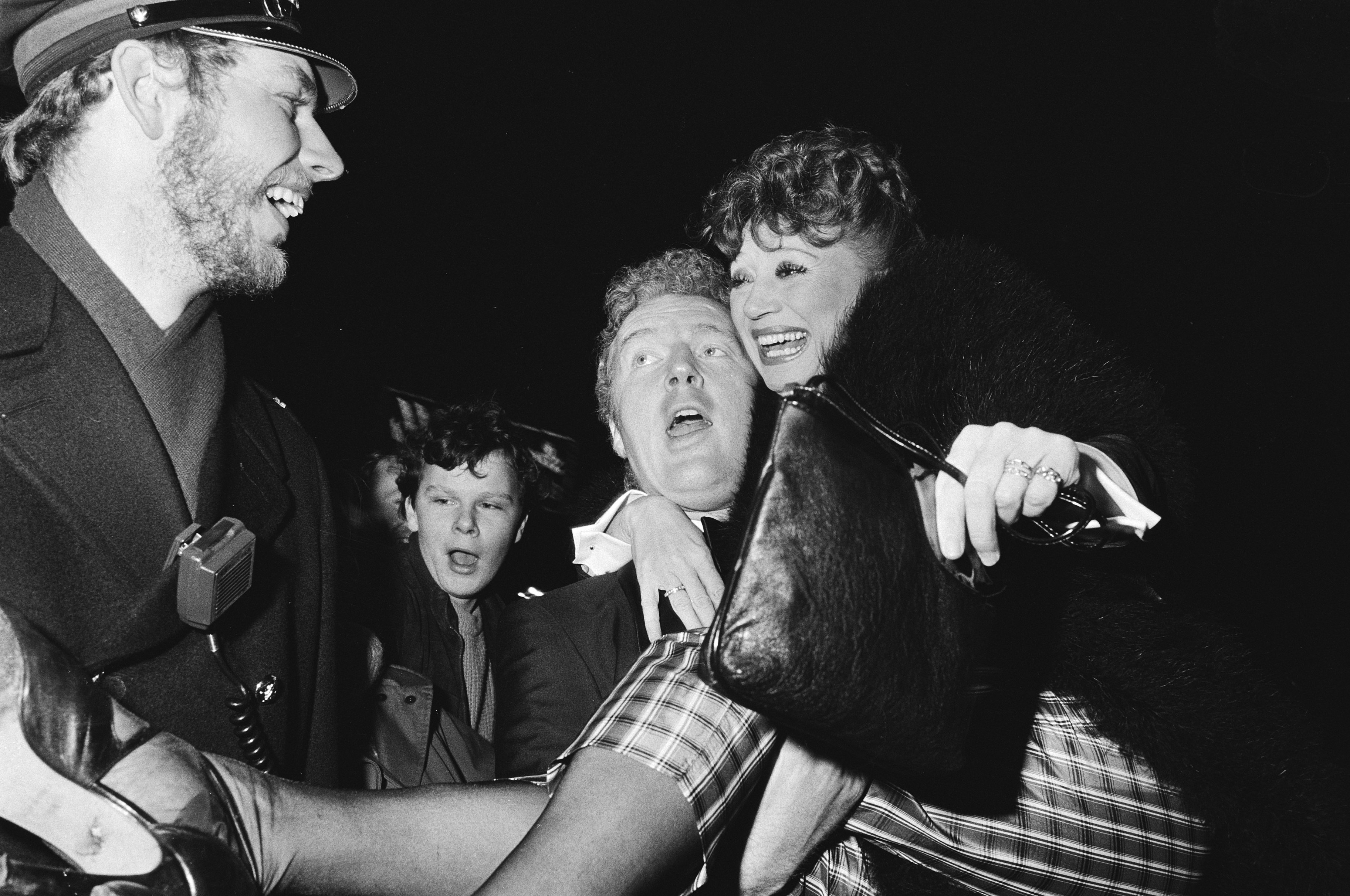 Collectie / Archief : Fotocollectie Anefo Reportage / Serie : Première van de film "De Boezemvriend" van André van Duin in Amsterdam Beschrijving : André van Duin draagt Corrie van Gorp uit een koetsje Datum : 8 december 1982 Locatie : Amsterdam, Noord-Holland Trefwoorden : acteurs, premières, regisseurs, speelfilms Persoonsnaam : Duin, André van, Gorp, Corrie van Fotograaf : Antonisse, Marcel / Anefo Auteursrechthebbende : Nationaal Archief Materiaalsoort : Negatief (zwart/wit) Nummer archiefinventaris : bekijk toegang 2.24.01.05 Bestanddeelnummer : 932-4311